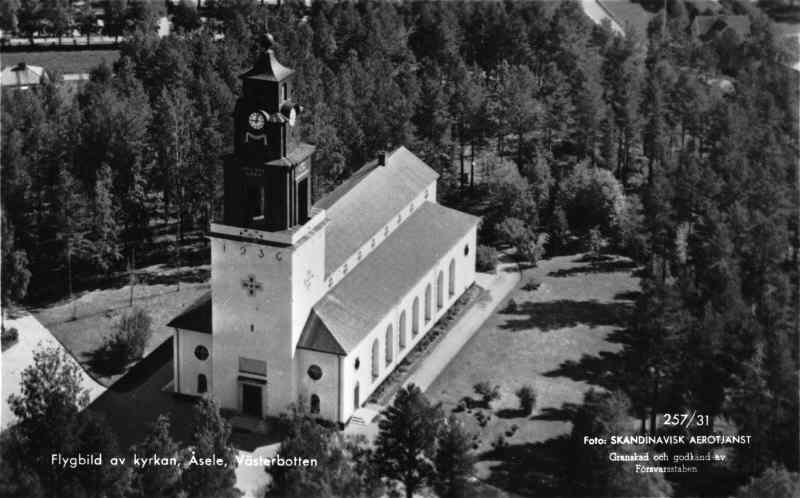 Kyrkan med omgivningar, flygbild. Nyckelord: Flygbilder Kategori: (01) ExteriörerKyrkan med omgivningar, flygbild.